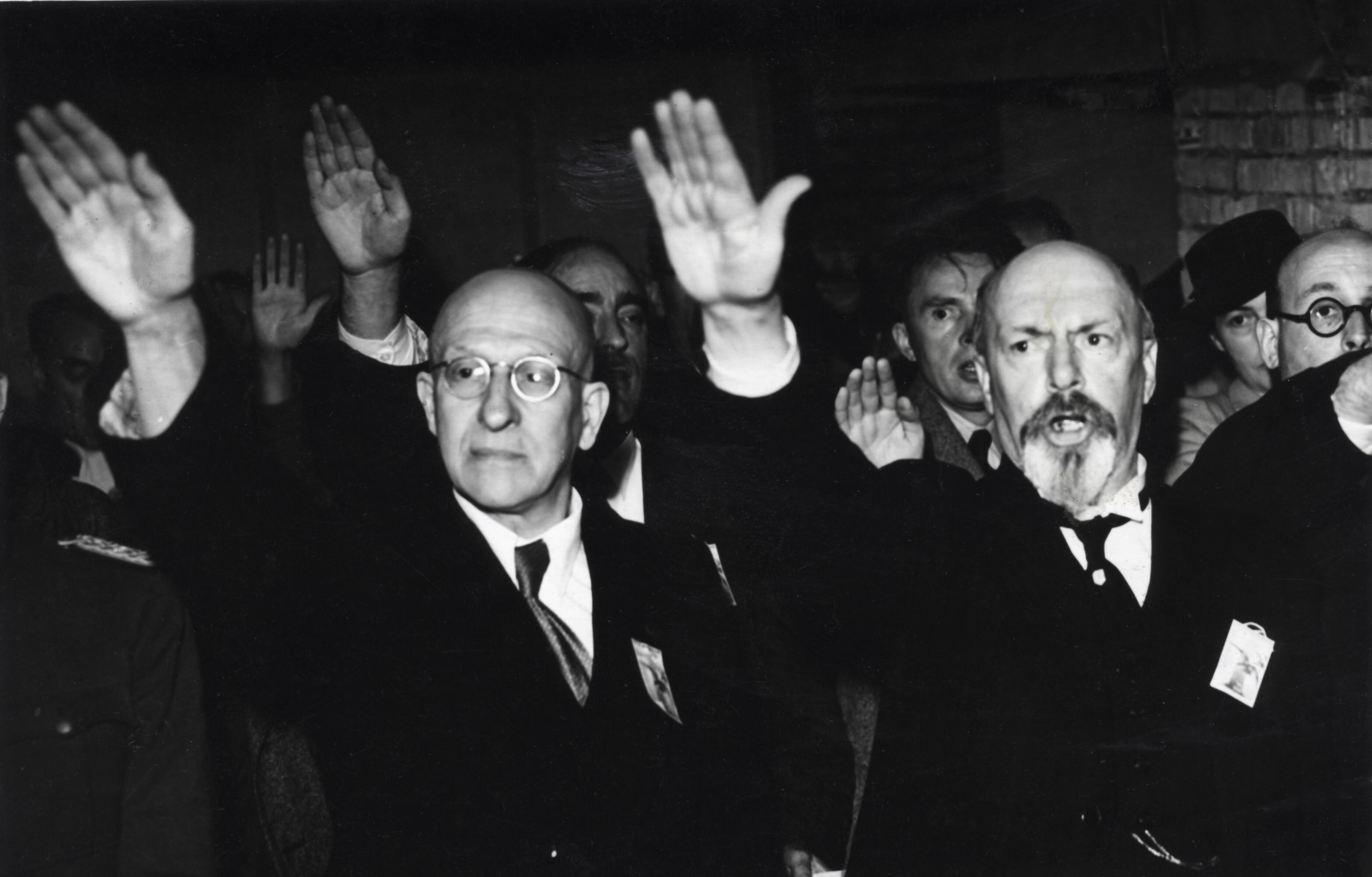 Diksmuide (Diksmude): 22ste IJzerbedevaart. 24 augustus 1941. Belgisch arts en Vlaams voorman prof. Frans Daels (links) en dr. August Borms brengen Hitlergroet tijdens gezamenlijke uitvoering van De Vlaamse Leeuw (het Vlaamse volkslied).